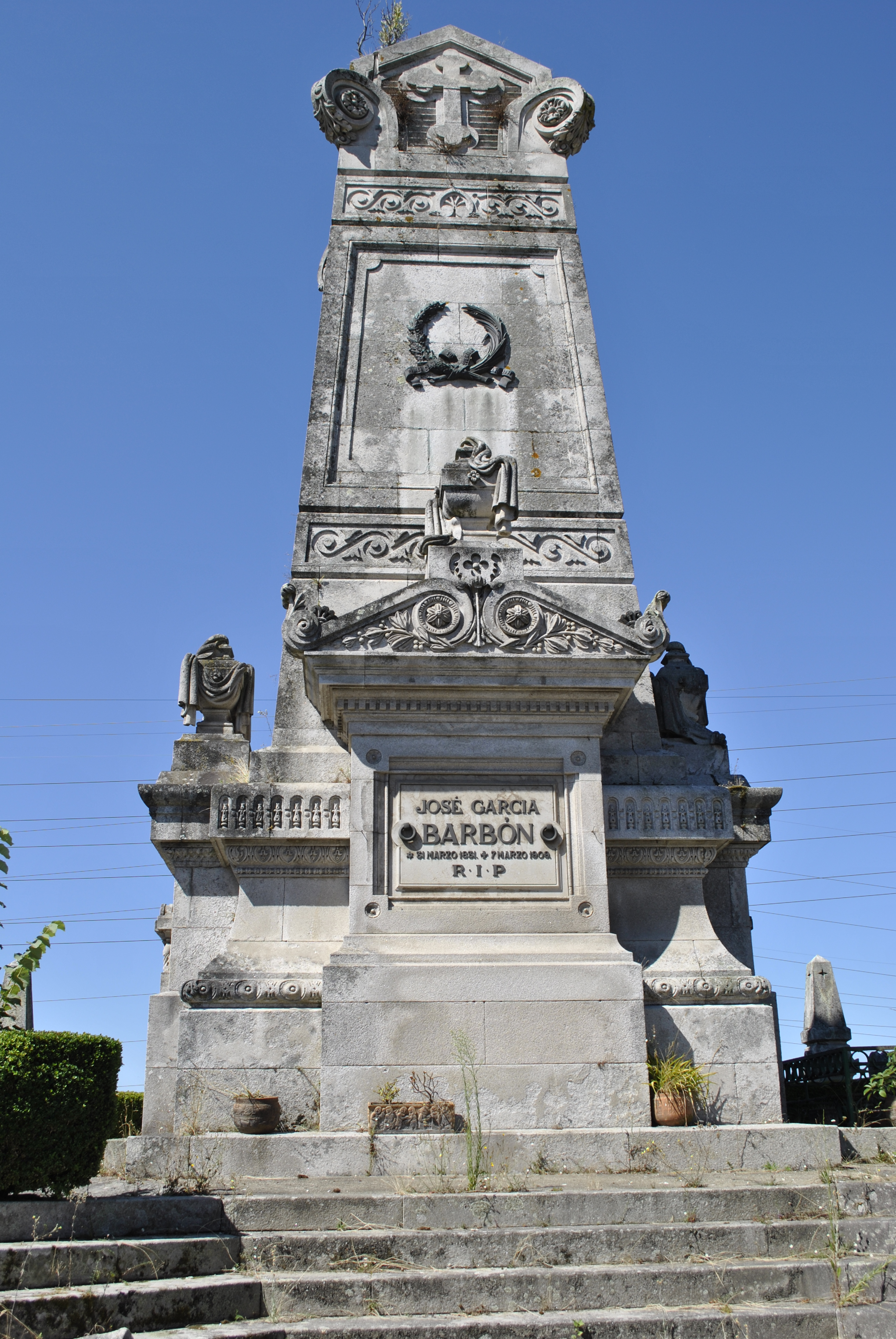 Pereiró, a José García Barbón, 1831 - 1909.jpg